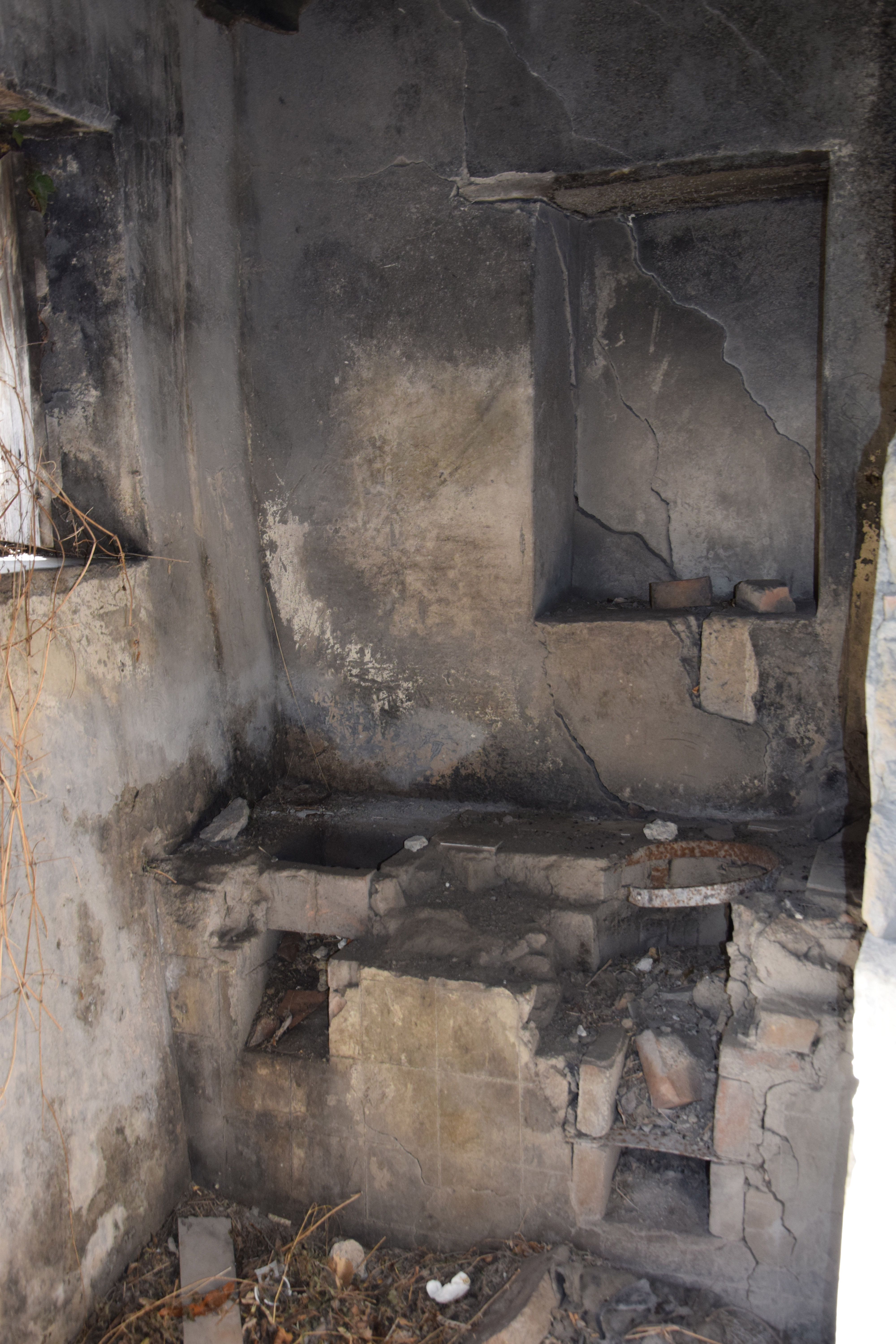 Il vecchio centro,ora abbandonato, di Tocco Caudio (BN)